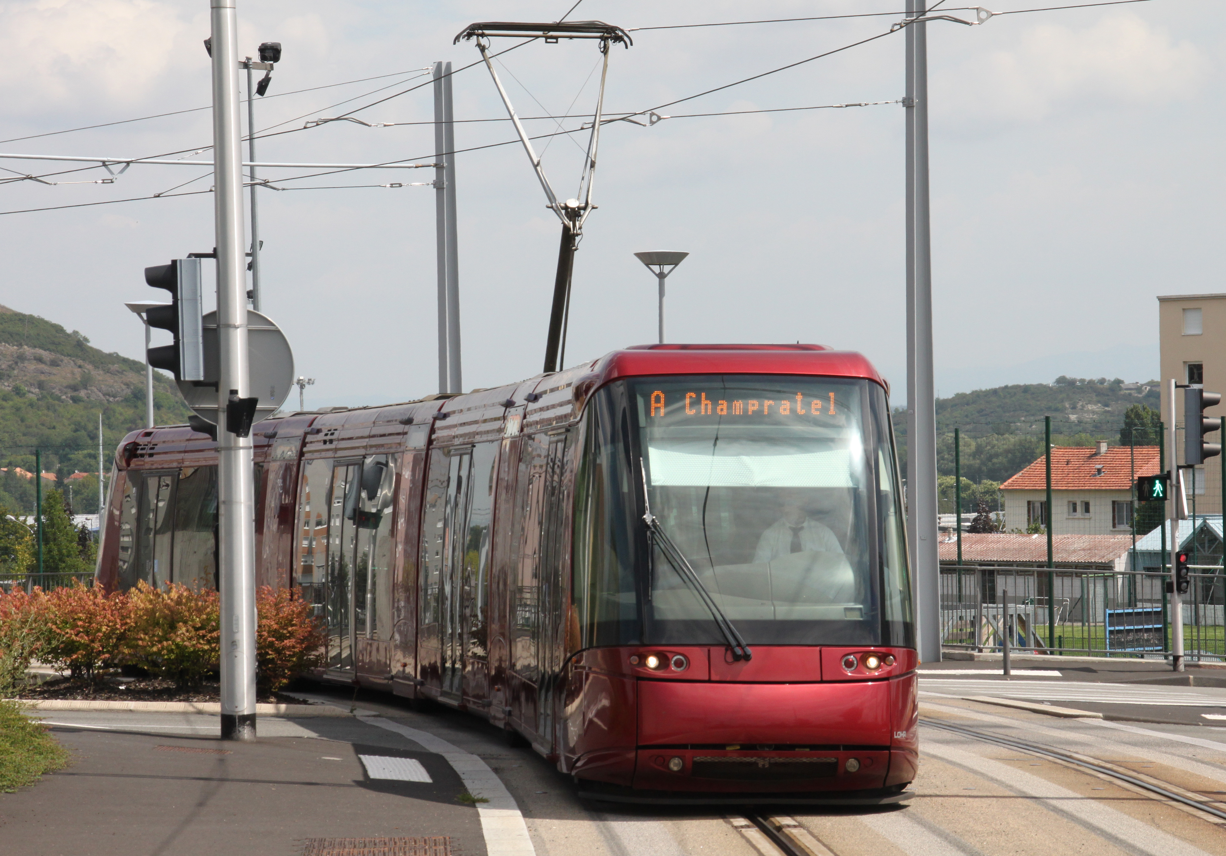 Een Translohr komt aan op een halte in Clermont-Ferrand.